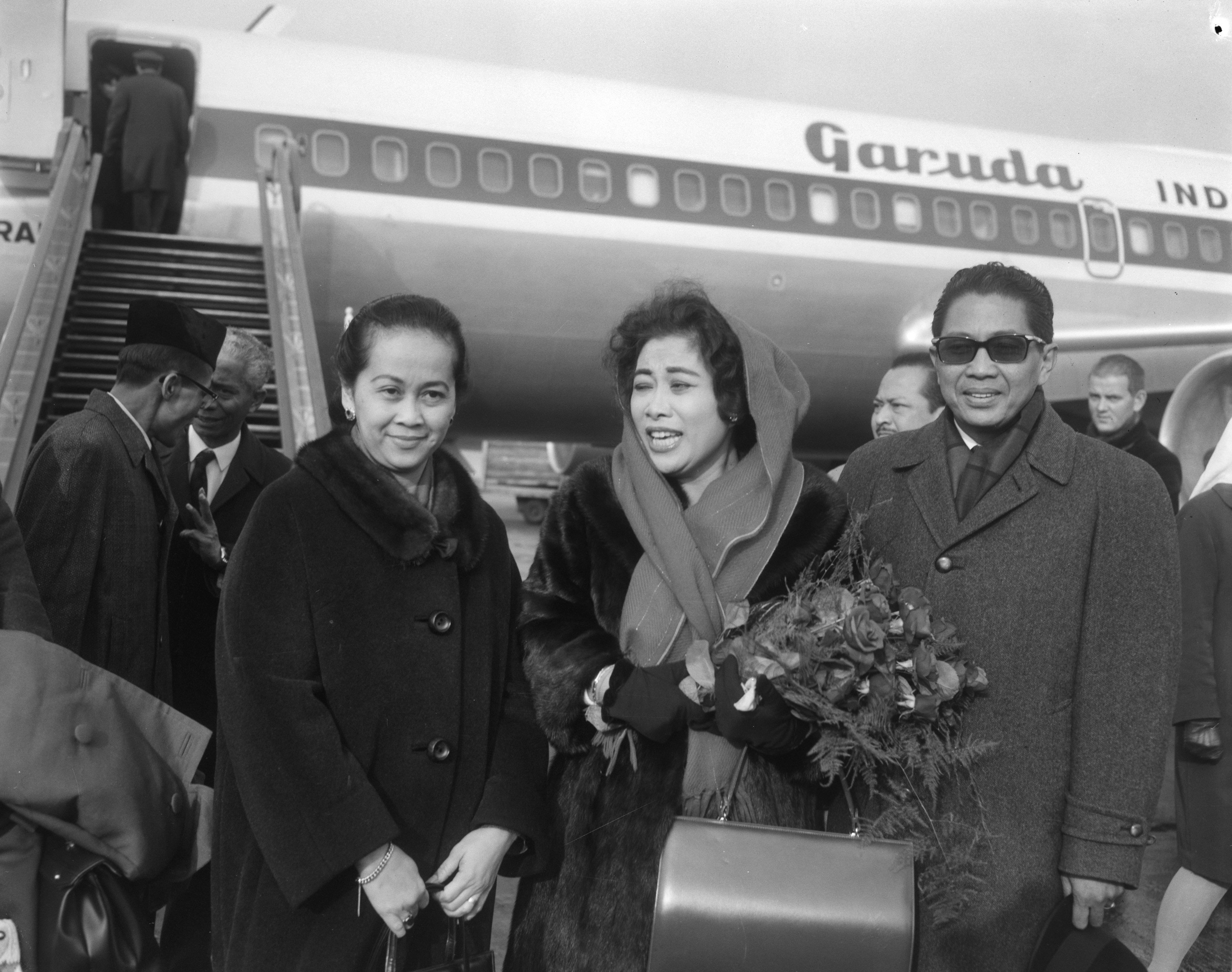 Collectie / Archief : Fotocollectie Anefo Reportage / Serie : Aankomst van mevrouw Fatmawati Soekarno op Schiphol Beschrijving : Soekarno, Fatmawati Datum : 5 november 1966 Locatie : Noord-Holland, Schiphol Trefwoorden : aankomst en vertrek, vliegtuigen Persoonsnaam : Soekarno, Fatmawati Fotograaf : Bilsen, Joop van / Anefo Auteursrechthebbende : Nationaal Archief Materiaalsoort : Negatief (zwart/wit) Nummer archiefinventaris : bekijk toegang 2.24.01.04 Bestanddeelnummer : 919-7564